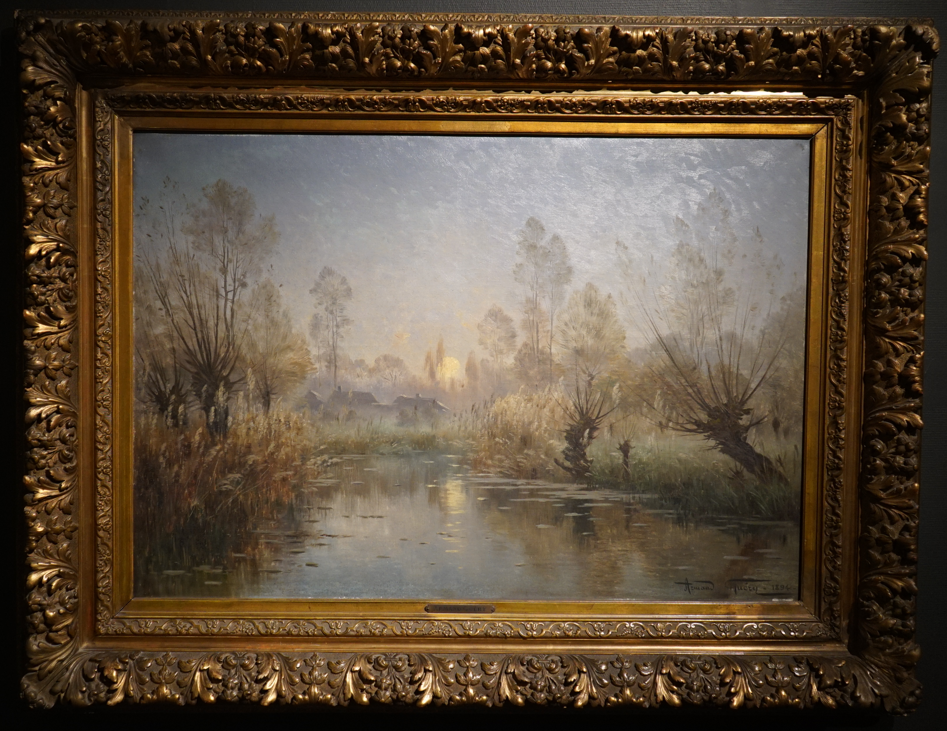 au musée st-Denis de Reims lors de la Nuit des Musées à Reims en 2019.